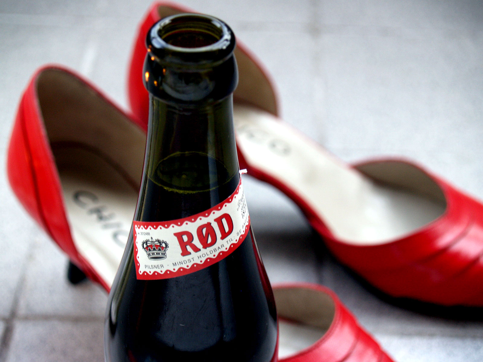 Rød Tuborg